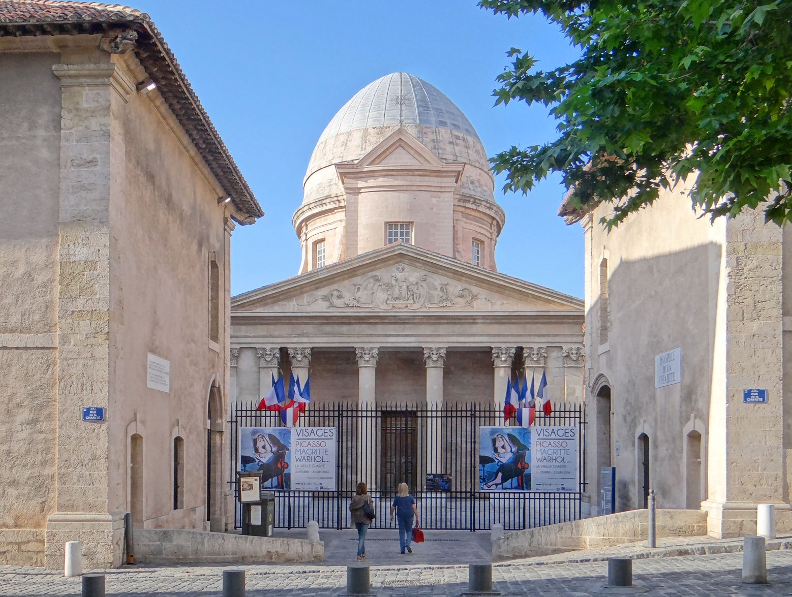 L'entrée de la Vieille Charité avec de face la chapelle baroque à coupole ovale C'est en 1640, suite à l'édit royal sur "l'enfermement des pauvres et des mendiants", que la Ville de Marseille, propriétaire d'un terrain situé près de la cathédrale de la Major sur le versant nord de la butte des moulins, décide de la construction de la Vieille Charité pour y accueillir les gueux. Mais le projet piétine et c'est seulement en 1670 que Pierre Puget, architecte du Roi et enfant du quartier, entame une de ses plus grandes réalisations.